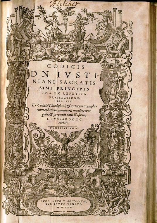 Codex Iustinianus